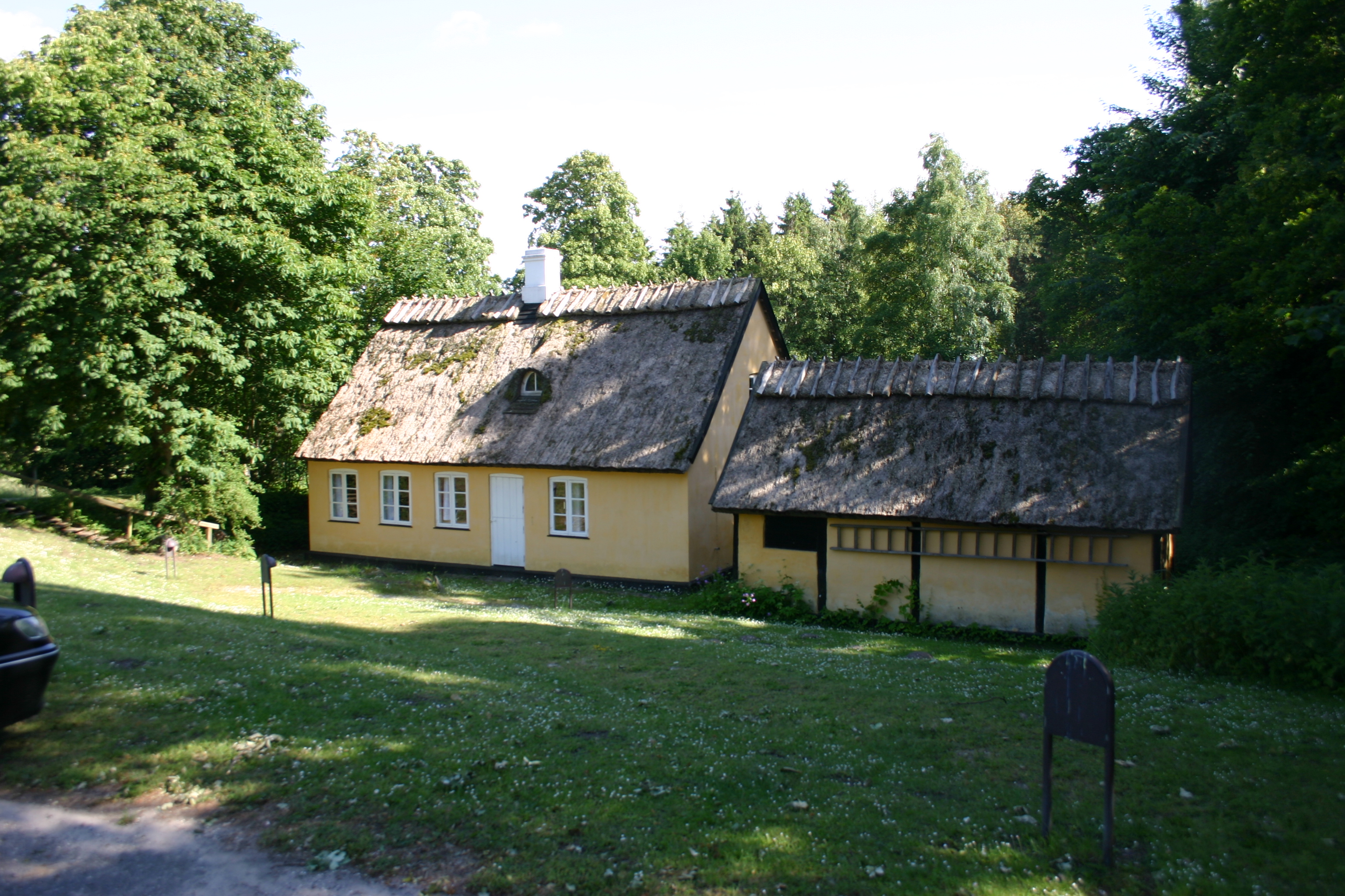 Gretely v. Tibirke Kirke